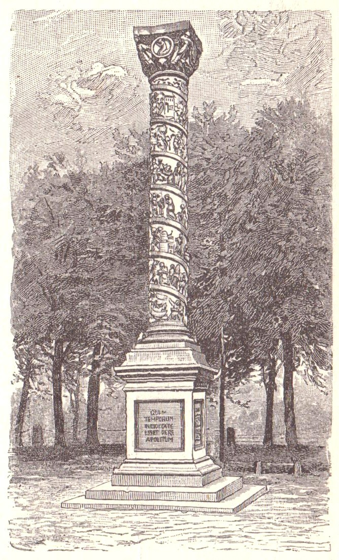 Zeichnung der bernwardinischen Christussäule mit klassizistischem Sockel auf dem Großen Domhof in Hildesheim (Zustand 1810-1893)